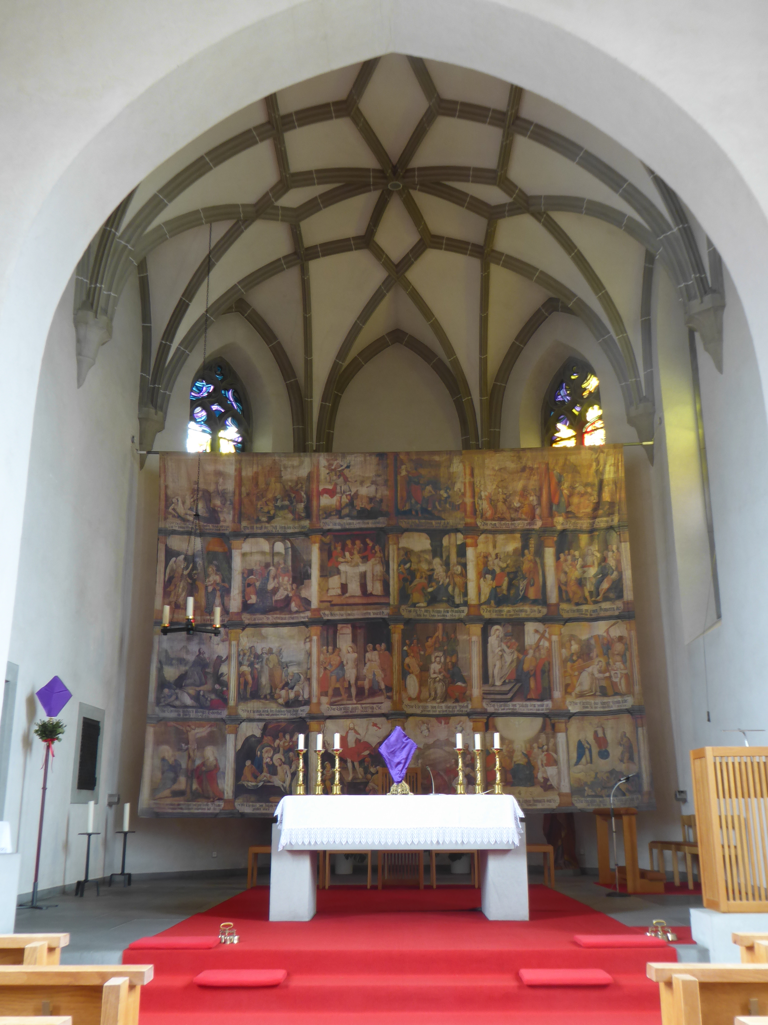 Benderer Fastentuch (Kopie aus dem Jahr 1983), aufgehängt vor dem Chorbogen der Benderer Pfarrkirche, Liechtenstein